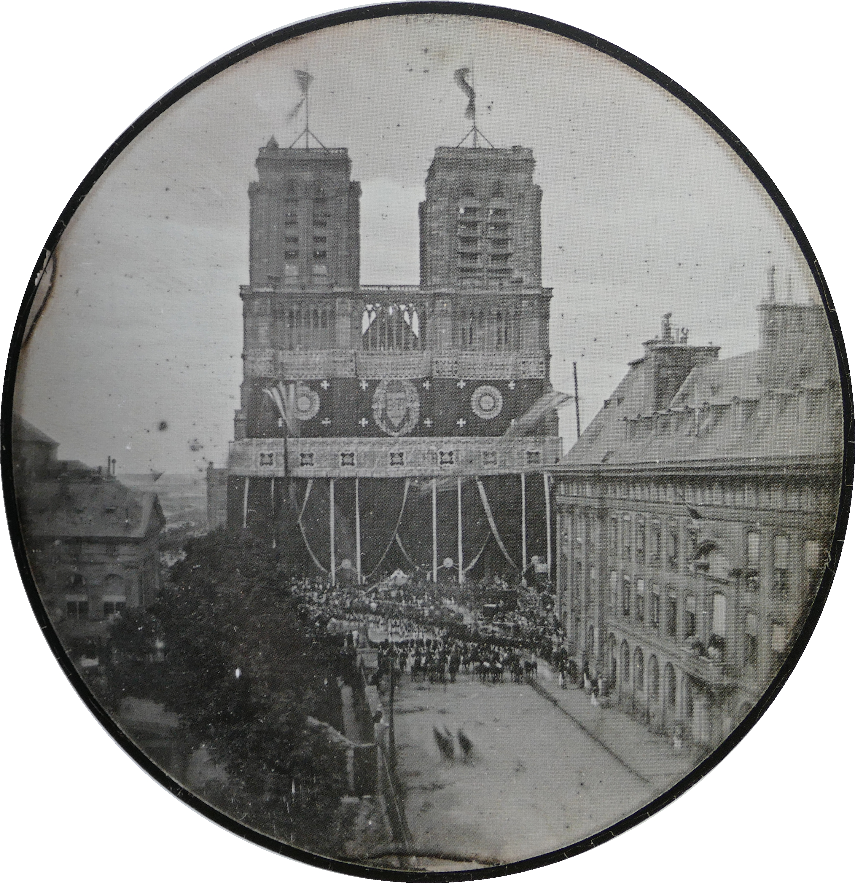 Daguerréotype de Marc-Antoine Gaudin, 1842. Image inversée, diamètre 7,2 cm. Musée d'Orsay, Paris. Funérailles du Prince Ferdinand Philippe d'Orléans.